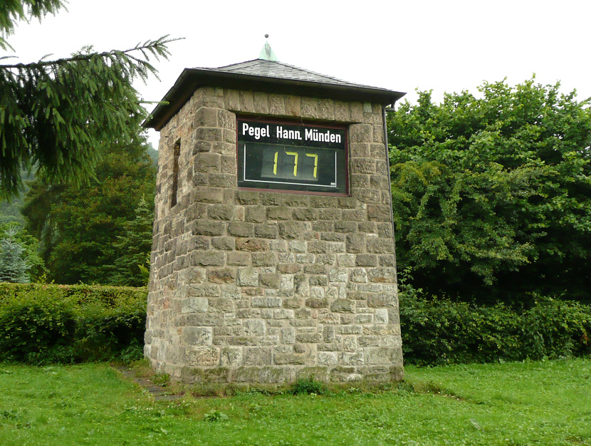 Weserpegel Hann. Münden